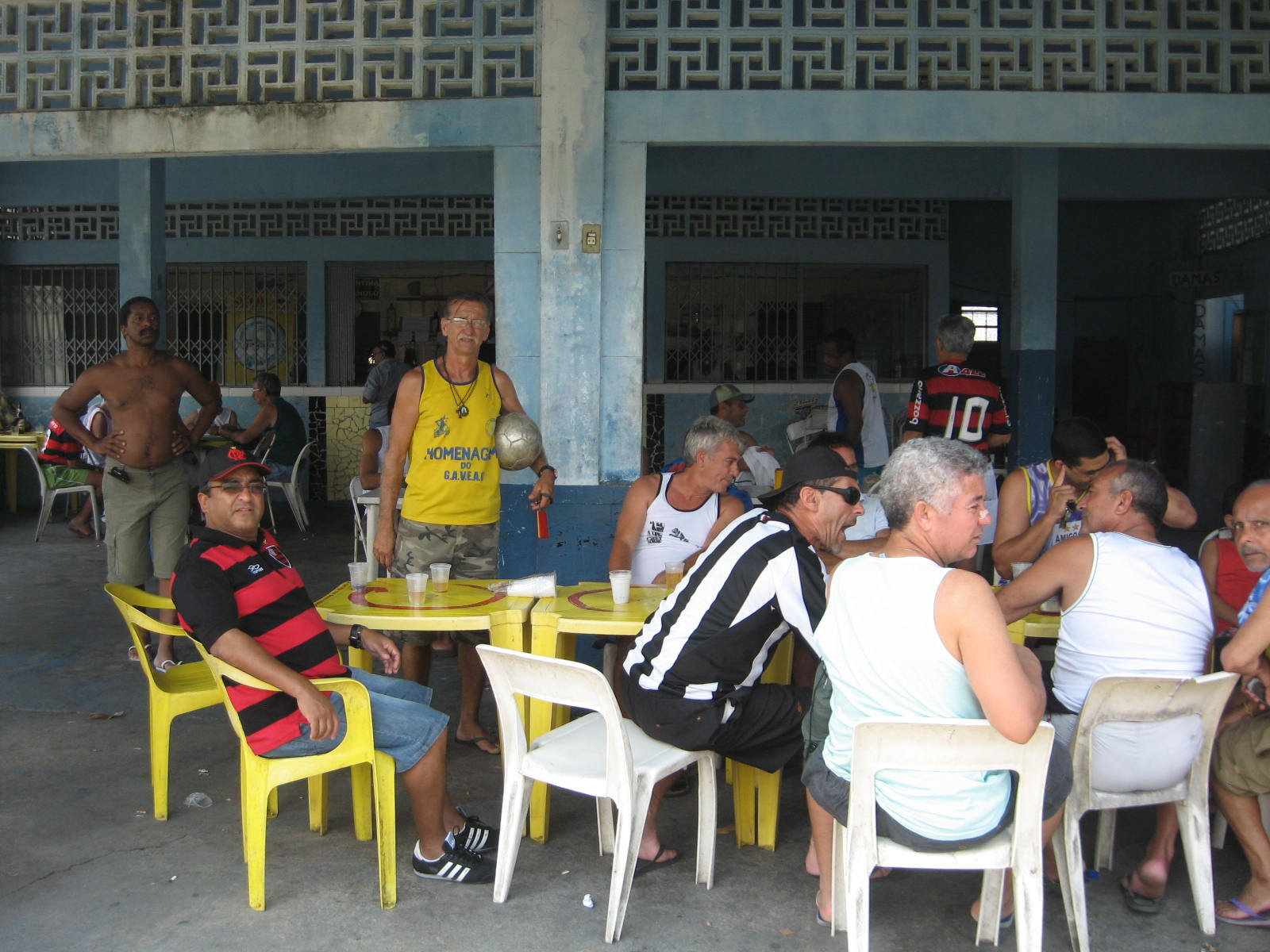 Detalhe do bar do Everest AC.